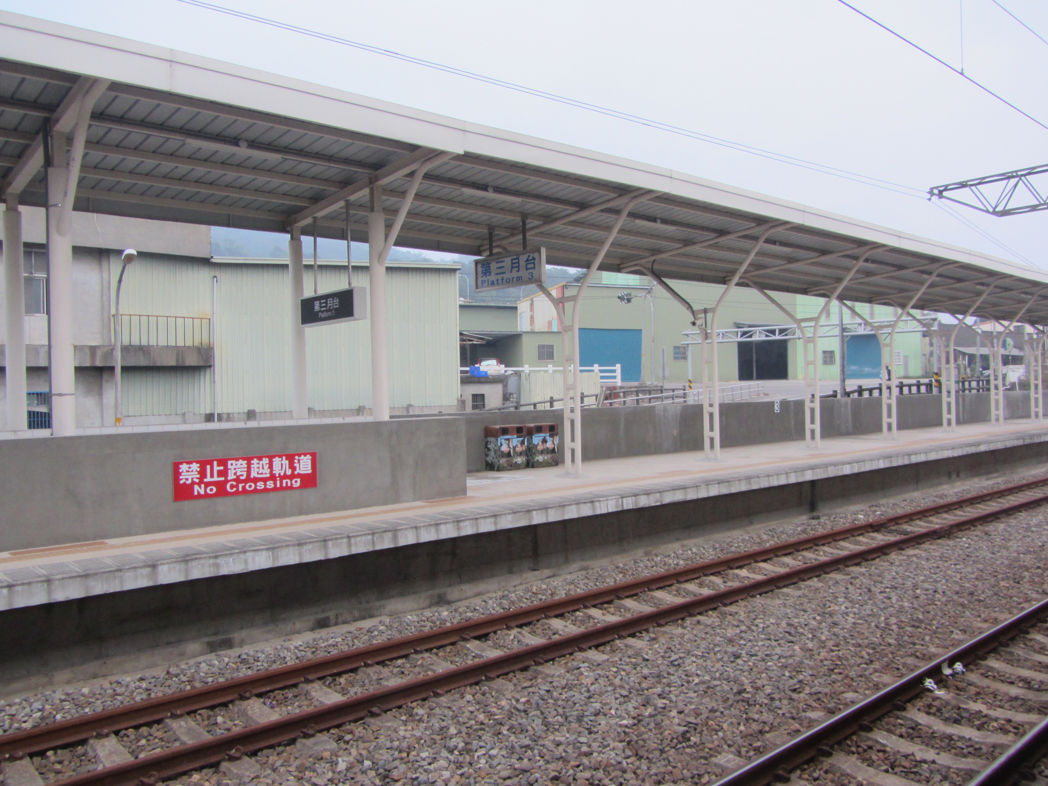 台灣鐵路管理局三義車站第三月台，為舊山線列車專用。